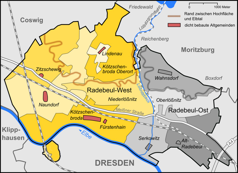 Karte der Stadt Kötzschenbroda (bis 1934) nebst dem linkselbischen Stadtteil Am Fährhaus